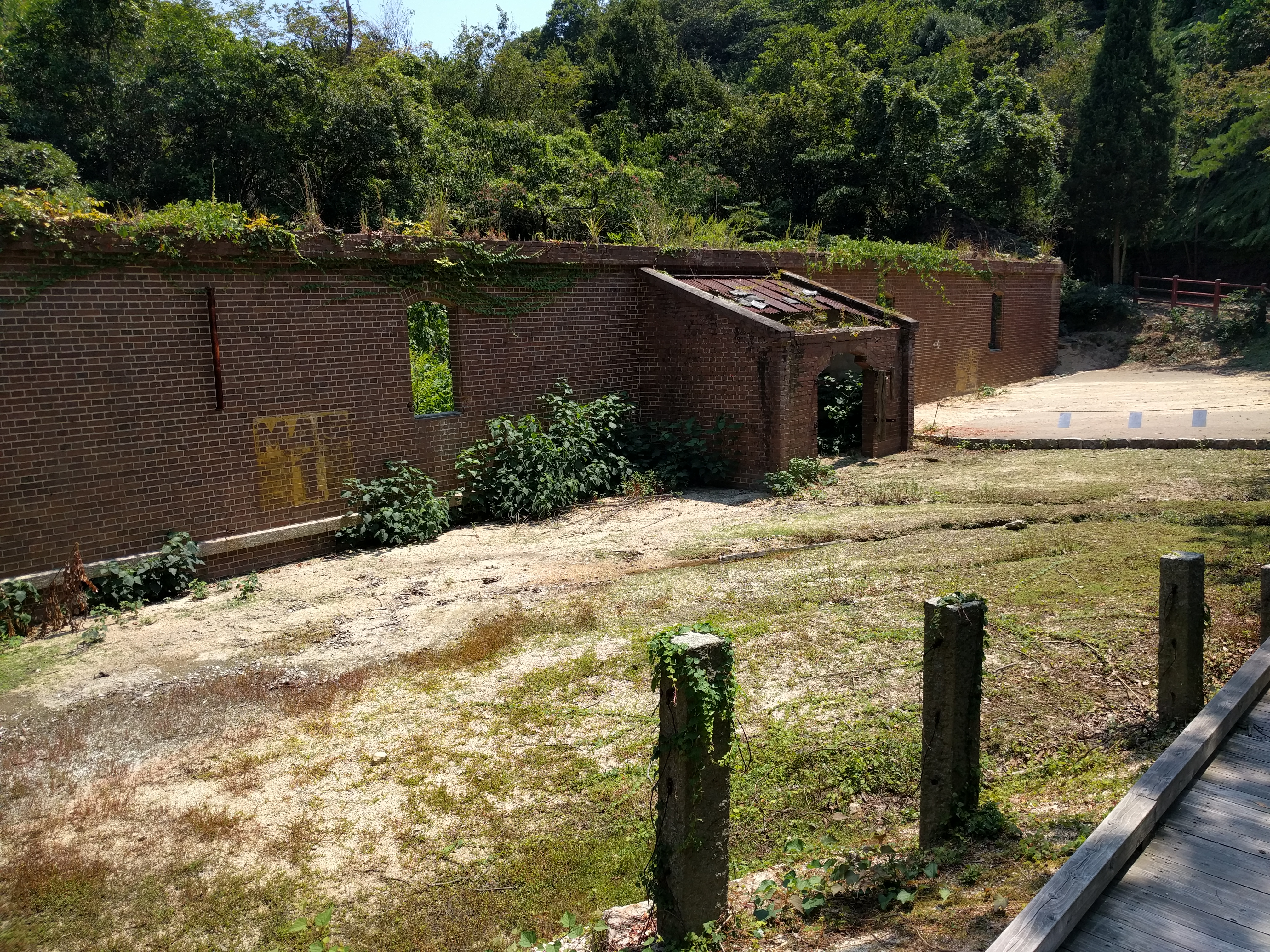 大久野島芸予要塞火薬庫跡